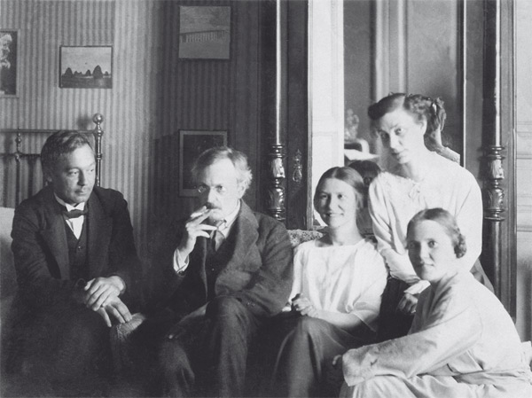 Российские (советские) математики Б.Н. Делоне (крайний слева) и Я.В. Успенский. Рядом с ним — его жена и сестра. Крайняя справа - супруга Б. Н. Делоне, М.Г. Делоне. Фото 1924 года.